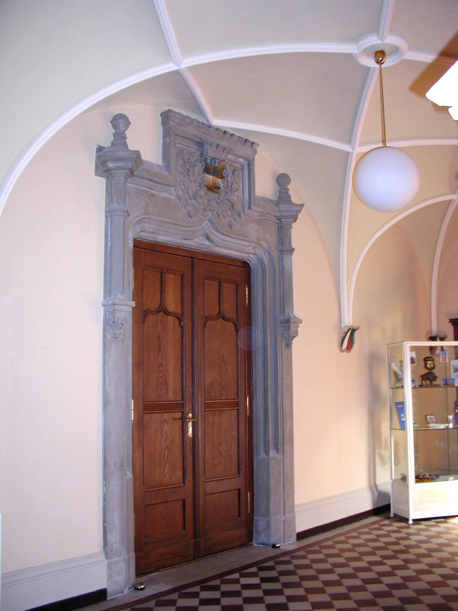 Rathaus Lichtenberg - Das Sandsteinportal des großen Sitzungssaales